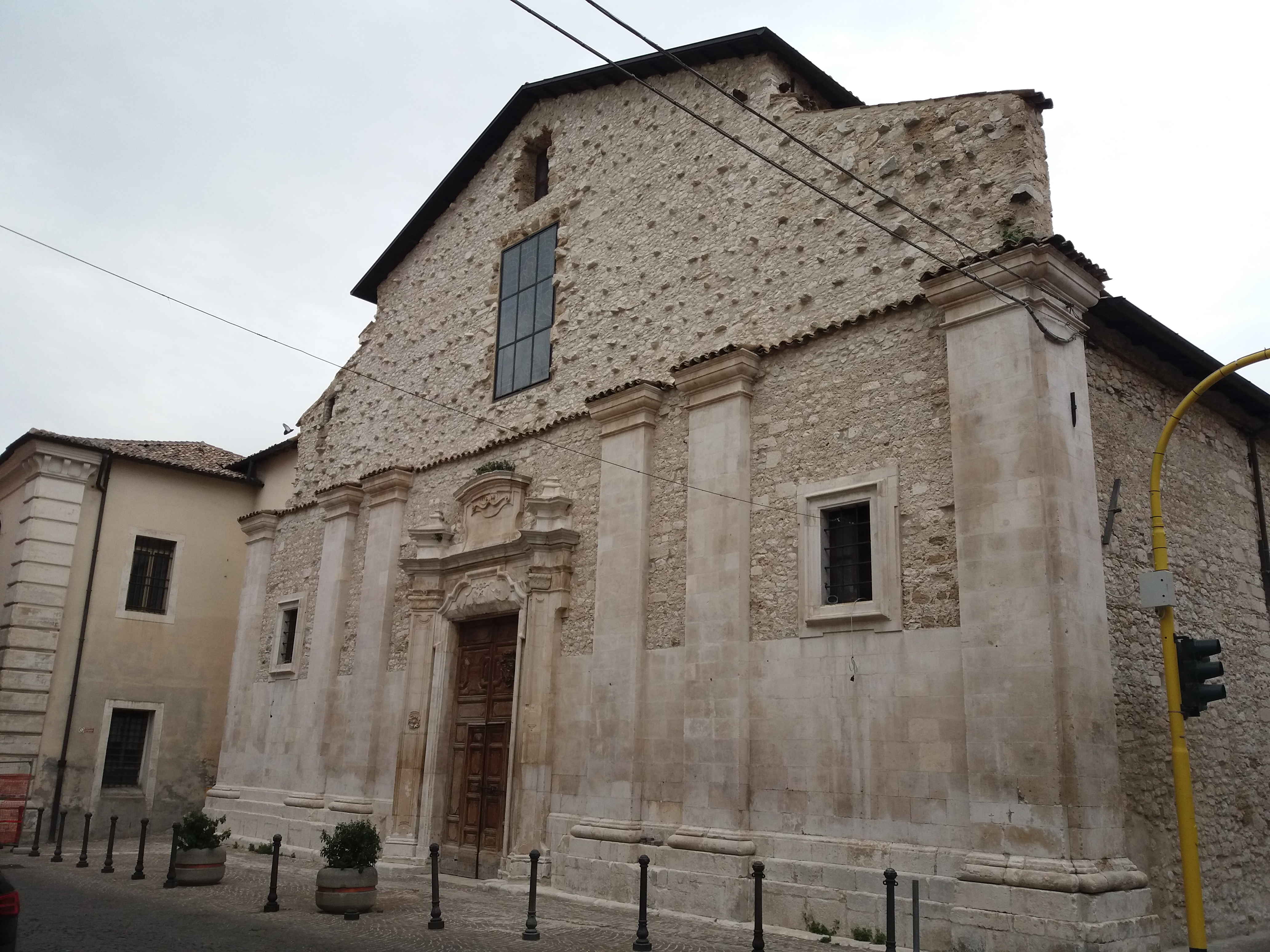 Sulmona: Chiesa di San Domenico